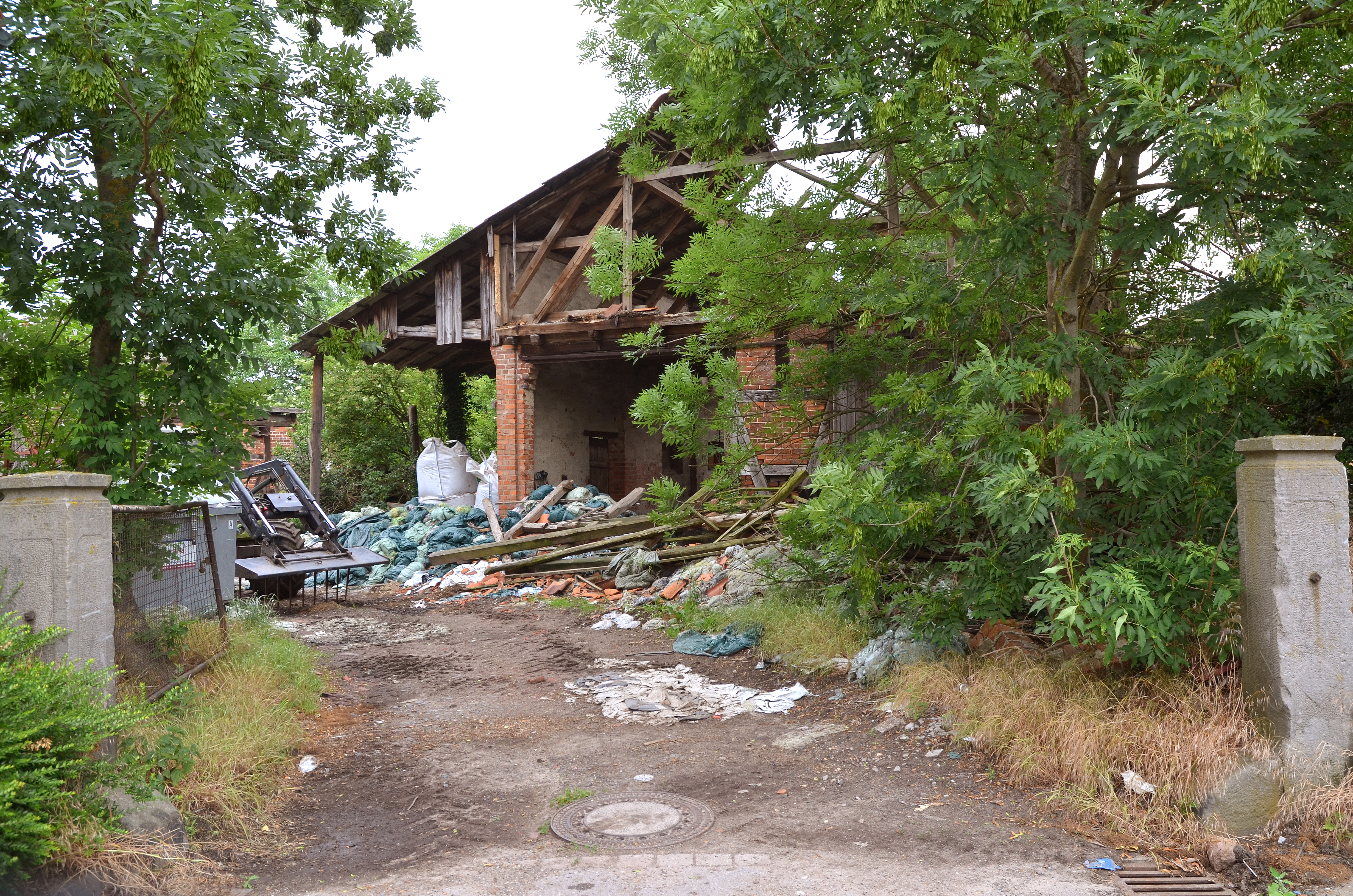 Dammfeldstraße 24: Blick vom Parkplatz im Zentrum des historischen Haufendorfes Aligse bei Lehrte durch die Einfahrt in die Hofstelle Dammstraße 24 und auf die - denkmalgeschützte - Längs-Durchfahrtscheune aus dem 18. Jahrhundert. Zu der Hofstelle, die sich in dieser Ansicht als Ansammlung von Müllhaufen, Gerümpel und kaum noch als Ruine darstellt, zählt auch das ebenfalls denkmalgeschützte Wohnwirtschaftsgebäude von 1689, das als Zweiständer-Fachwerkhallenhaus eines der wenigen erhaltenen Hallenhäuser des 17. Jahrhunderts der gesamten Region Hannover repräsentiert ...